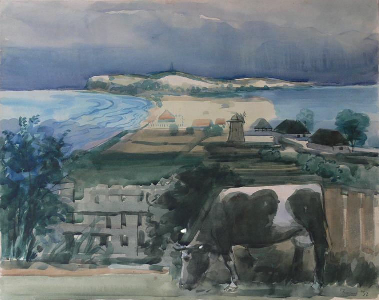 Titel: Hiddensee. Aquarell auf Papier. Maße: Unbekannt.